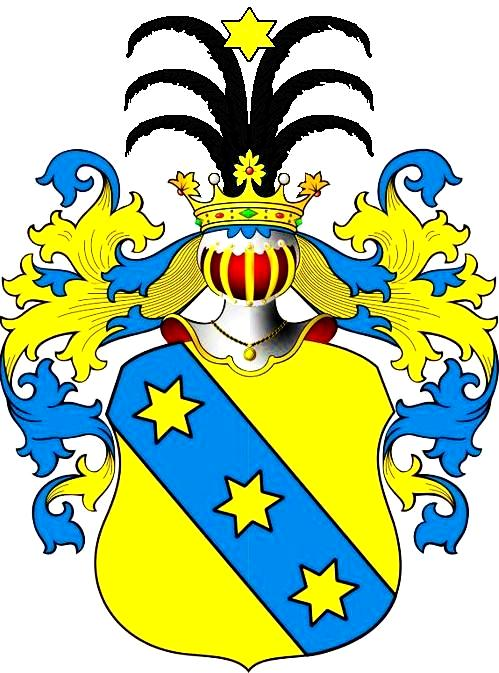 Wappen von Morgenstern, Grafik erstellt nach Blasonierung in: J. Siebmacher's grosses und allgemeines Wappenbuch, III. Band, 7. Abteilung, S. 5, Tafel 5; Der Adel des Herzogthums Anhalt; Verfasser: Ad. M. Hildebrandt; Publikation: Nürnberg: Bauer & Raspe, 1869.